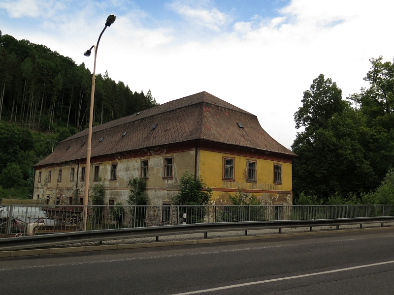 Hospoda, Arnoštov 11, Horní Sytová.